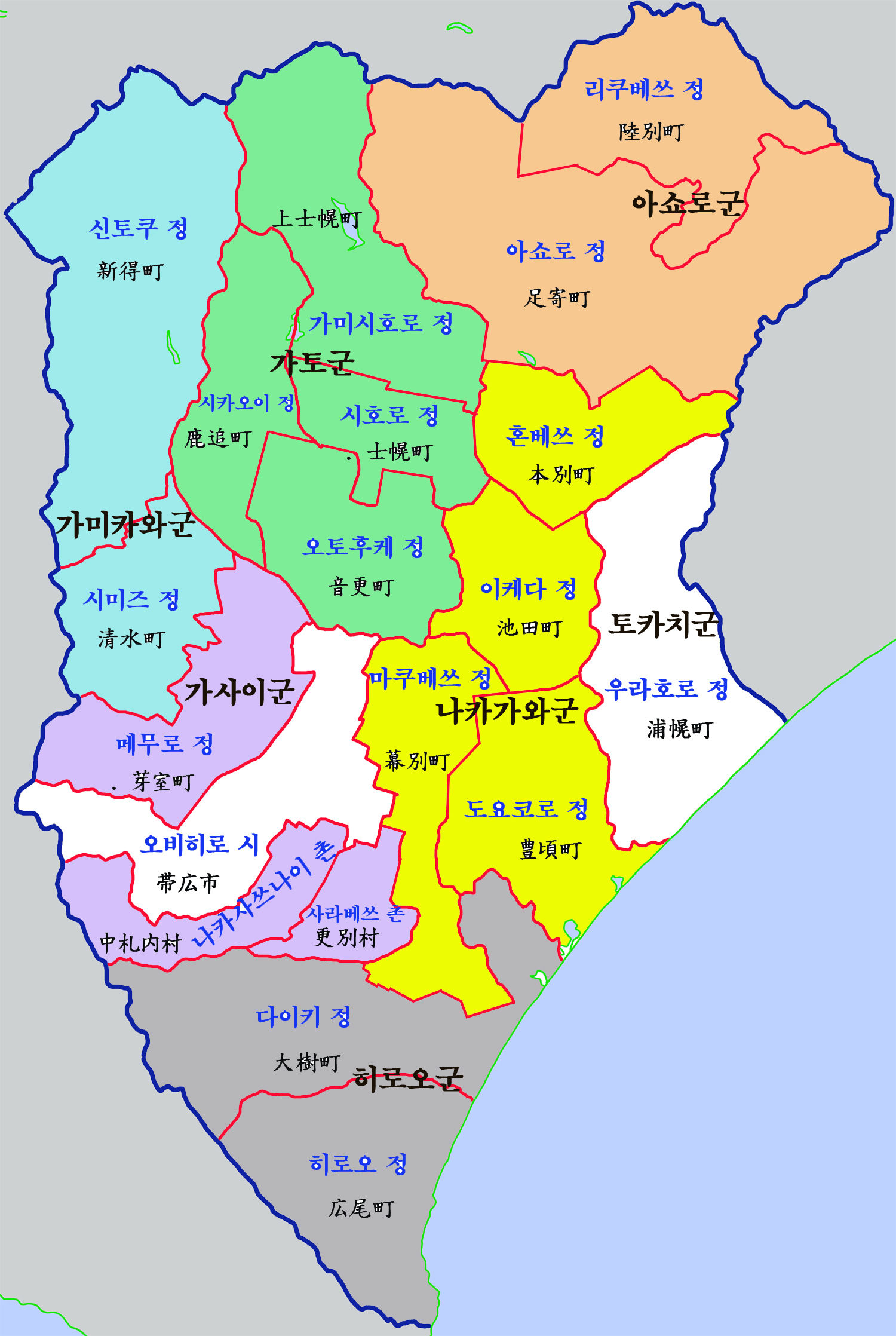 토카치 종합진흥국 행정구역